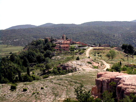 Imatge d'Albarca